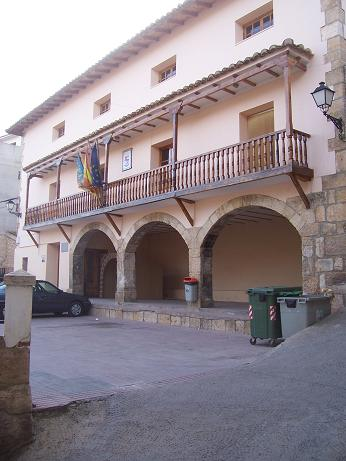 Fachada de la Casa de la Villa de Ademuz, Valencia (España)